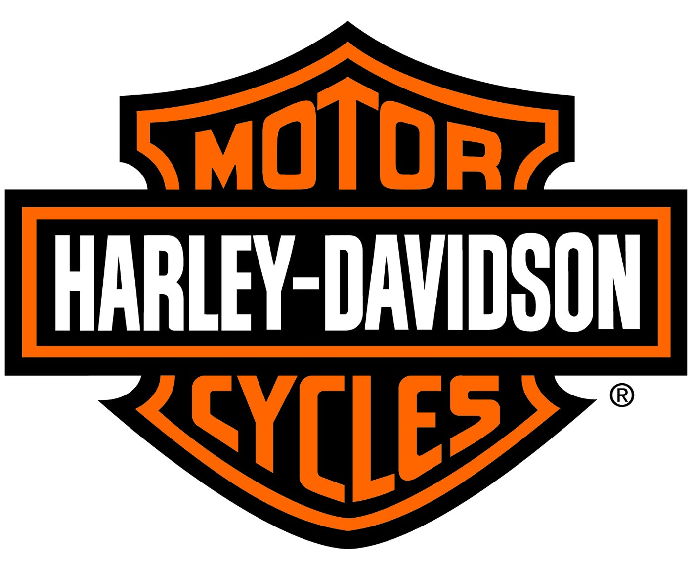 logo MHD